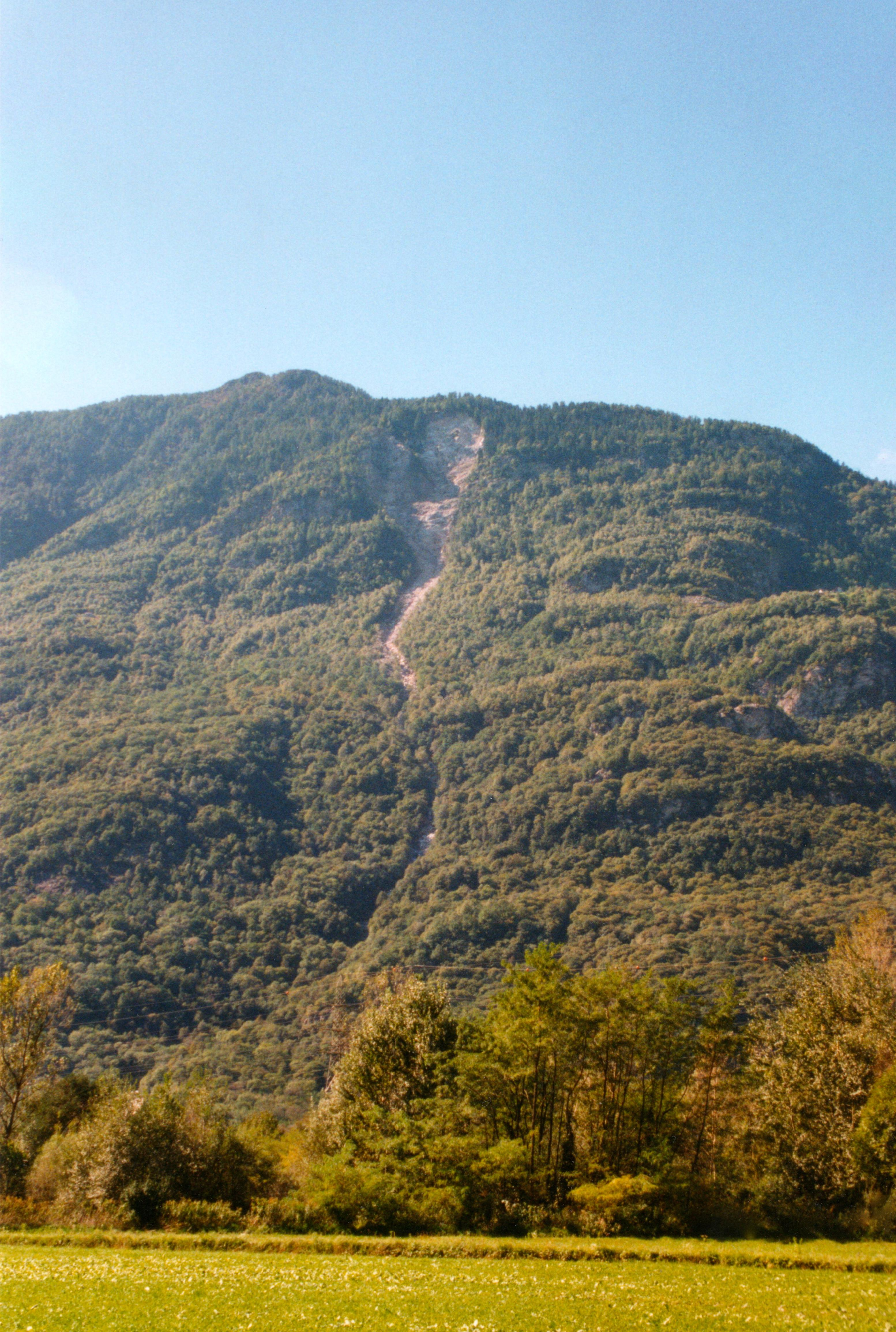 La frana del Valegion dopo lo scoscendimento di 25-28000 mc di materiale del 2001